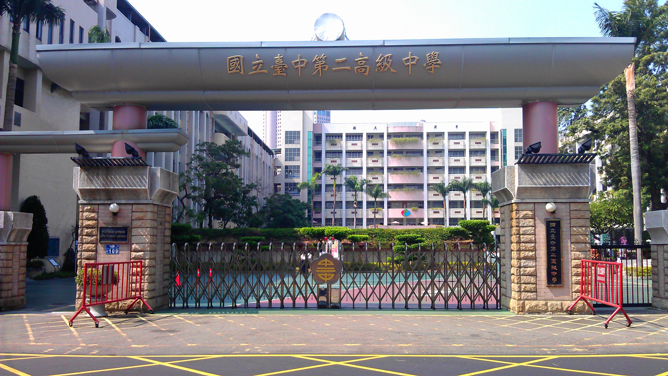 中文（台灣）: 國立台中二中